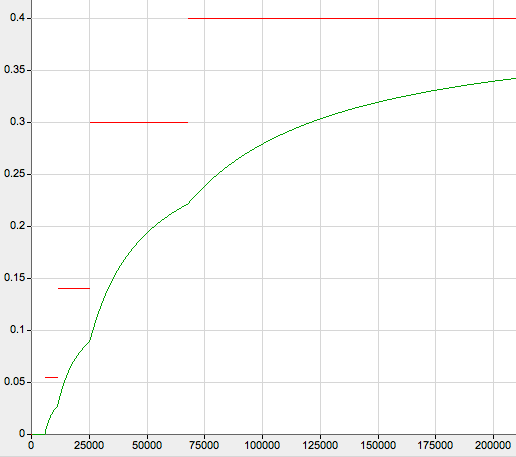 Taux d'imposition réels (vert) et marginaux (rouge) en fonction du revenu pour la France (barème de l'impôt sur le revenu pour 2008)